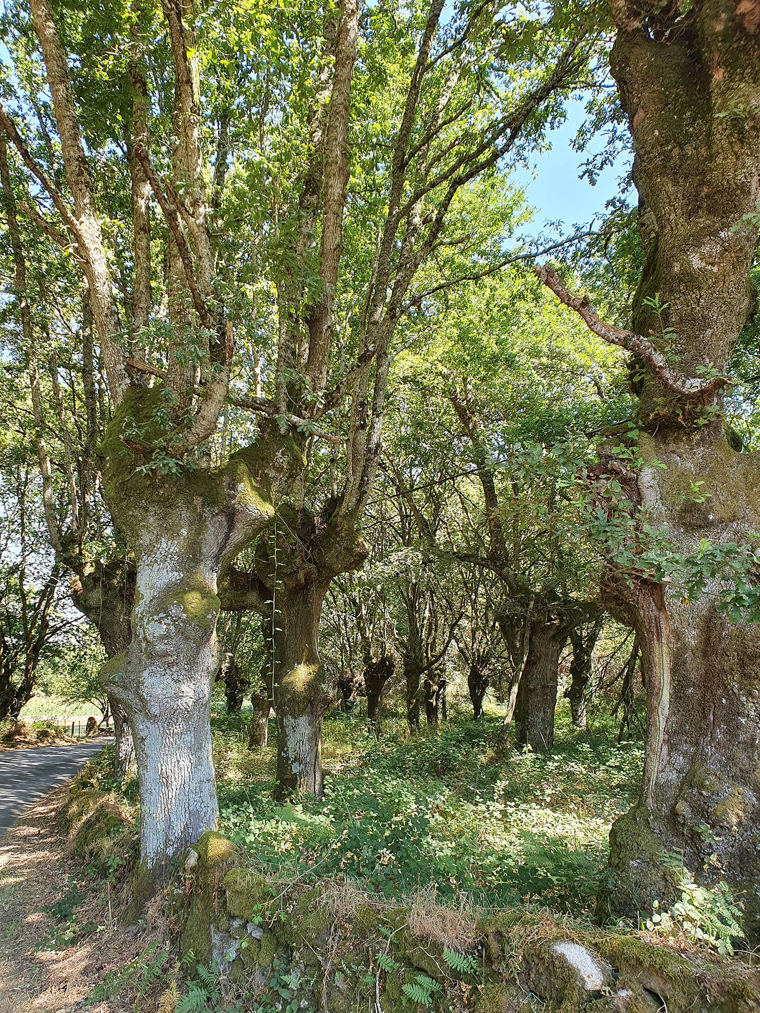 Lugar moi perto da vila de Antas de Ulla, actualmente sen núcleo poboado (incluso as vivendas que antigamente existiron no lugar están en total ruína, quedando unha frondosa carballeira a un e ao outro lado da estrada de Santa Cristina. Pódese dicir, polo tanto, que como poboación foi totalmente absorvido polo lindante Carballo.